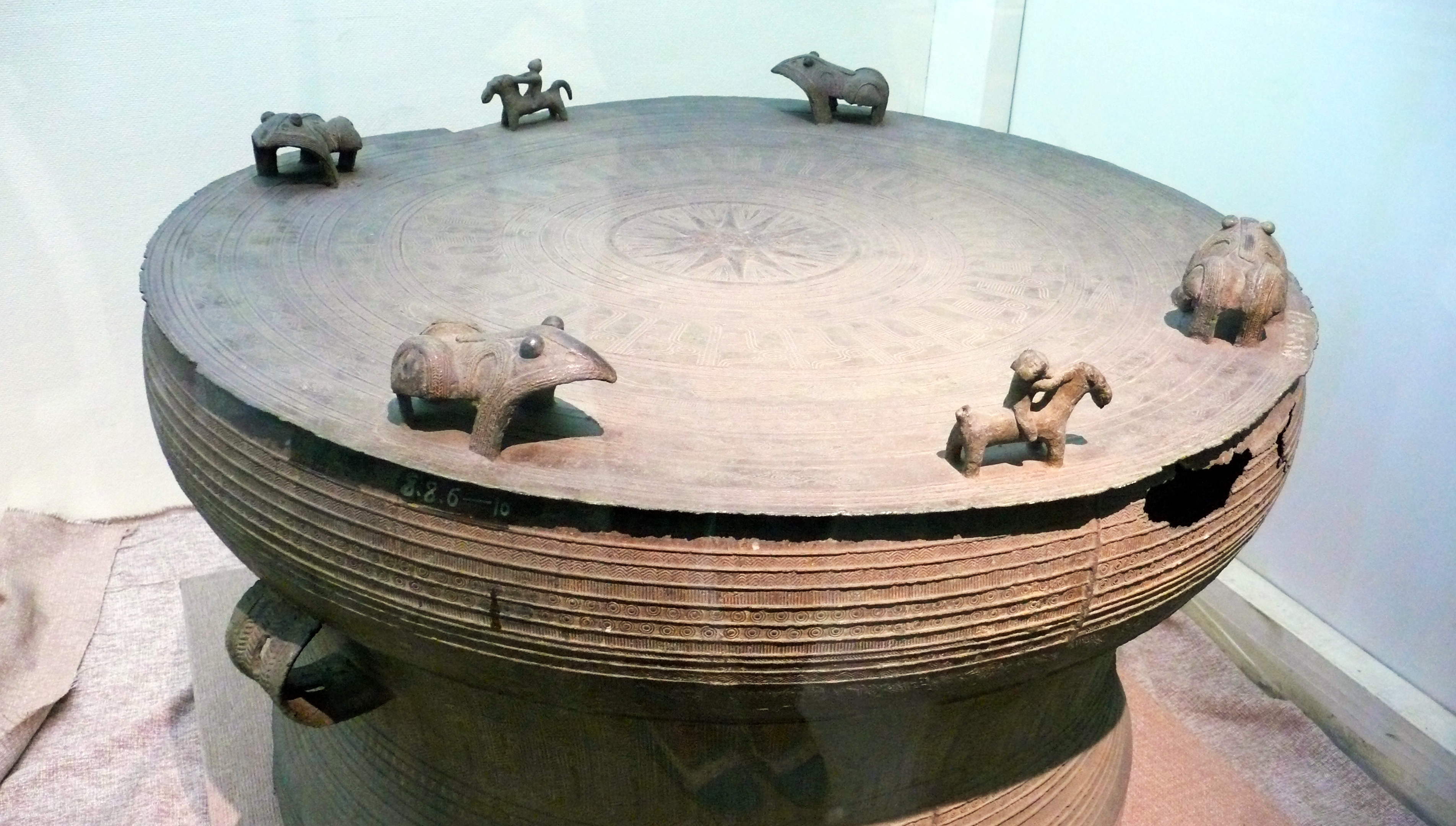 壮族铜鼓，以摩教信仰中的青蛙为装饰。民大民族博物馆藏。